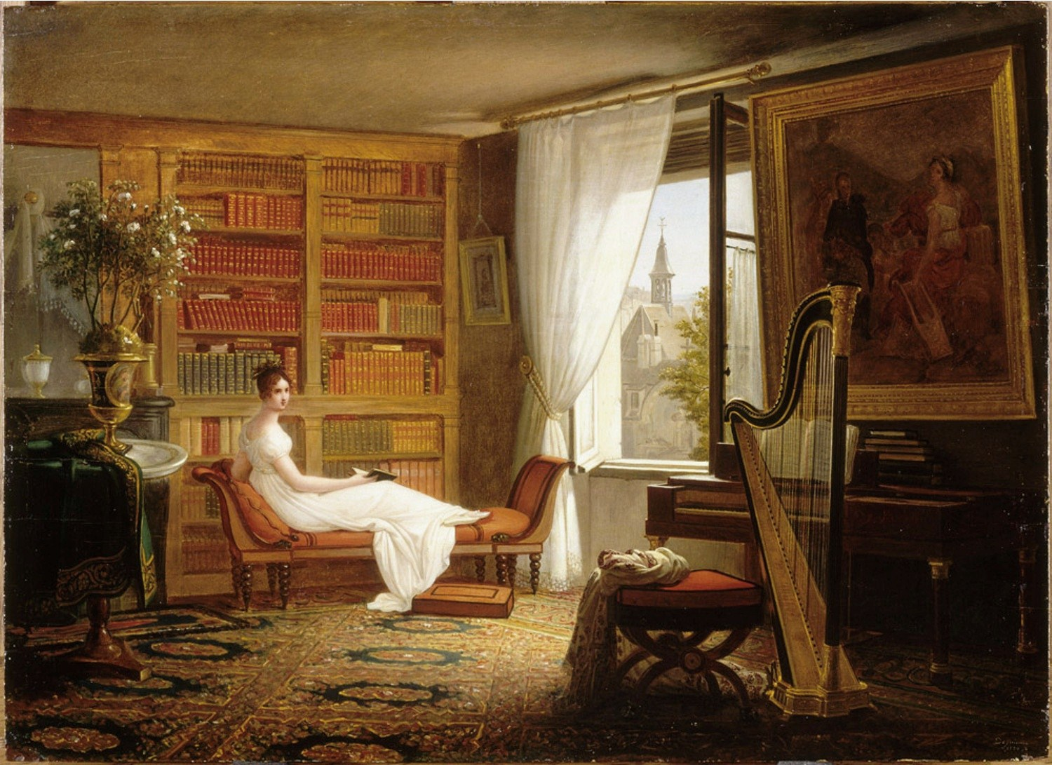 Juliette Récamier est une femme de lettres et tient un salon littéraire dans un appartement de l'Abbaye-aux-Bois rue de Sèvres à Paris, loué le 7 avril 1820. Elle emménage dans cet établissement religieux avec sa nièce, au mois d'octobre de la même année.